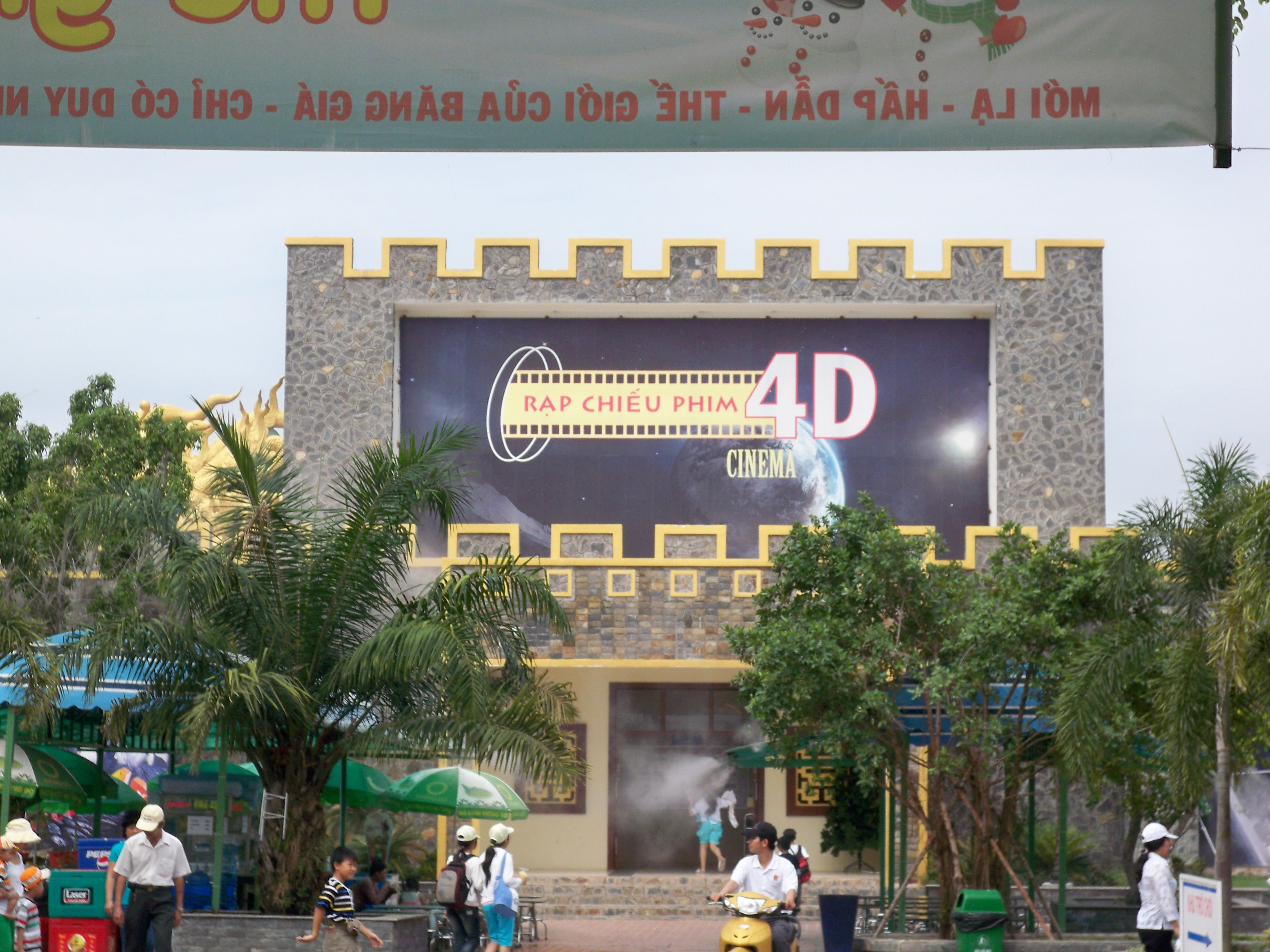 Đại nam 2